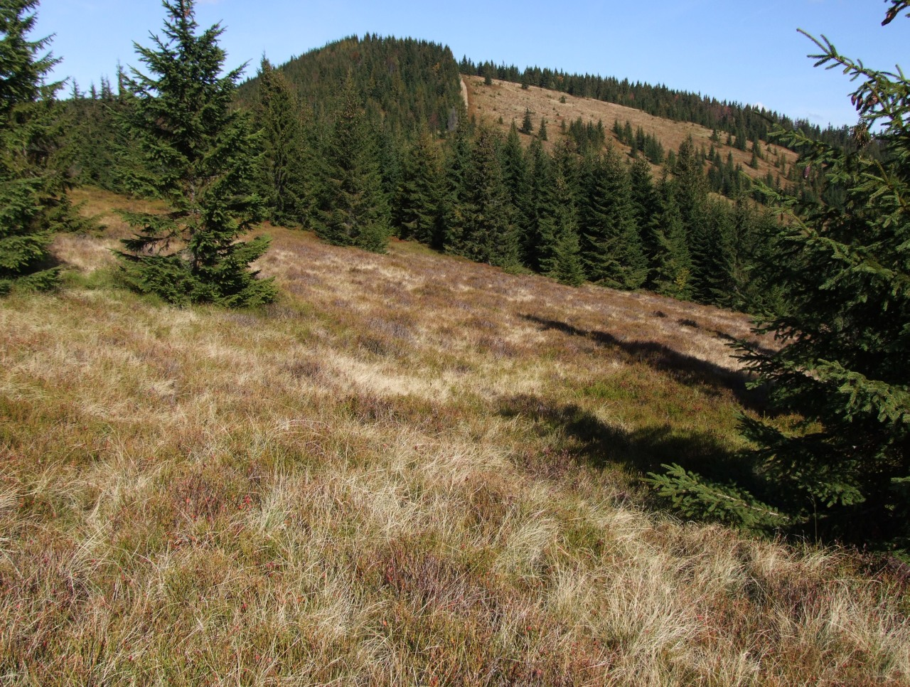 Gorce. Kiczora z Halą Młyńską, na dole polana Cioski Łopuszańskie